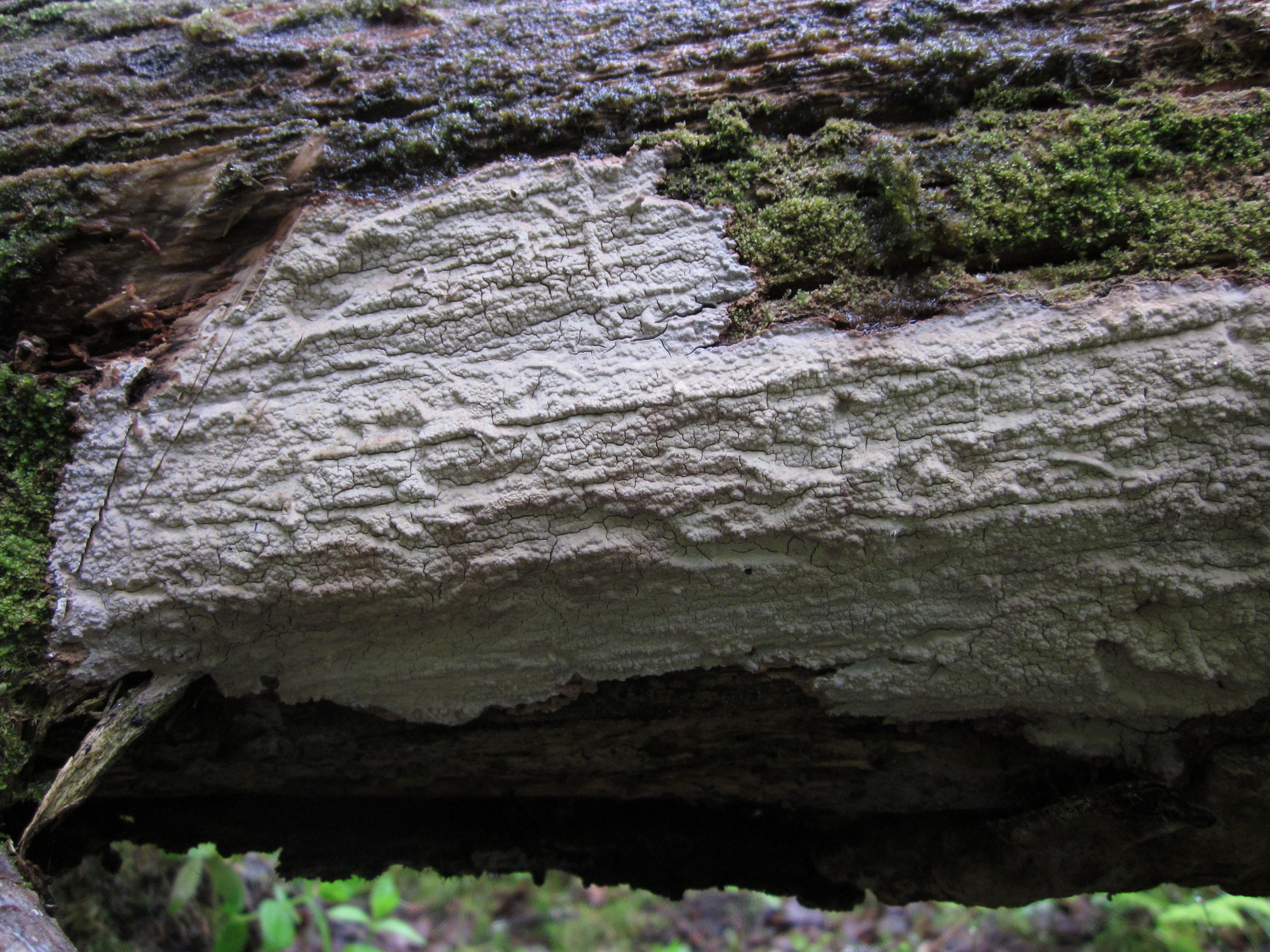 Doftskinn